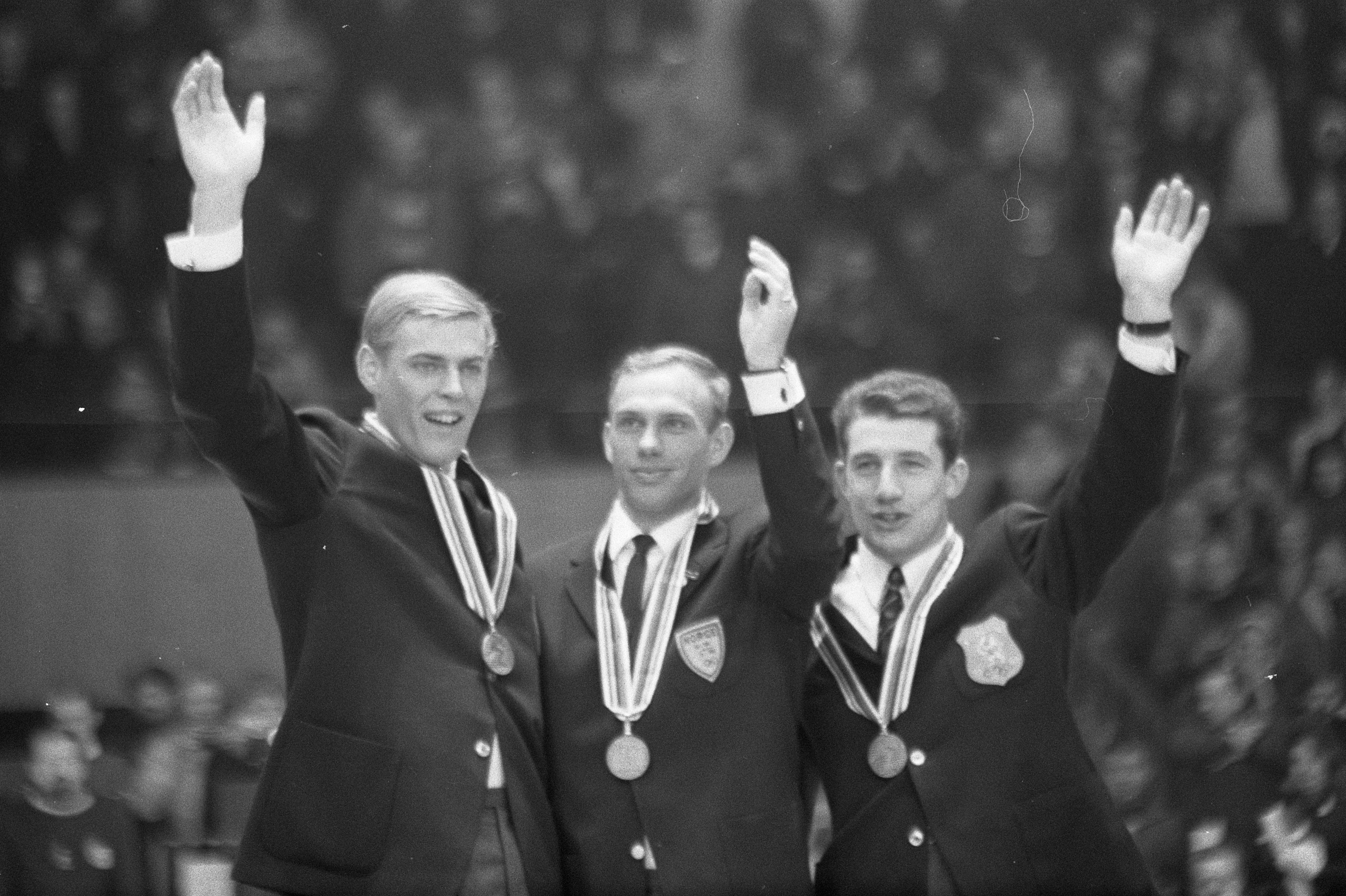 Collectie / Archief : Fotocollectie Anefo Reportage / Serie : [ onbekend ] Beschrijving : Olympische Winterspelen te Grenoble. De medaillewinnaars op de 1500 meter. Van links naar rechts Ard Schenk (gedeeld tweede), Ivar Eriksen (Noorwegen, gedeeld tweede) en Kees Verkerk (goud). Datum : 15 februari 1968 Locatie : Grenoble Trefwoorden : schaatsen, sport Persoonsnaam : Eriksen Ivar, Schenk, Ard, Verkerk, Kees Instellingsnaam : Olympische Winterspelen Fotograaf : Kroon, Ron / Anefo Auteursrechthebbende : Nationaal Archief Materiaalsoort : Negatief (zwart/wit) Nummer archiefinventaris : bekijk toegang 2.24.01.05 Bestanddeelnummer : 921-0850